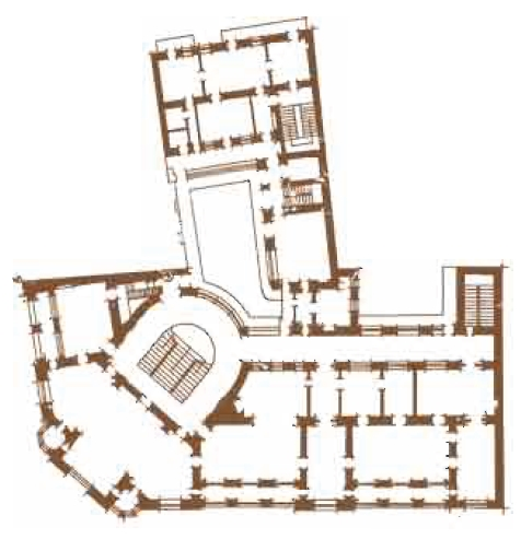 Səadət sarayının planı